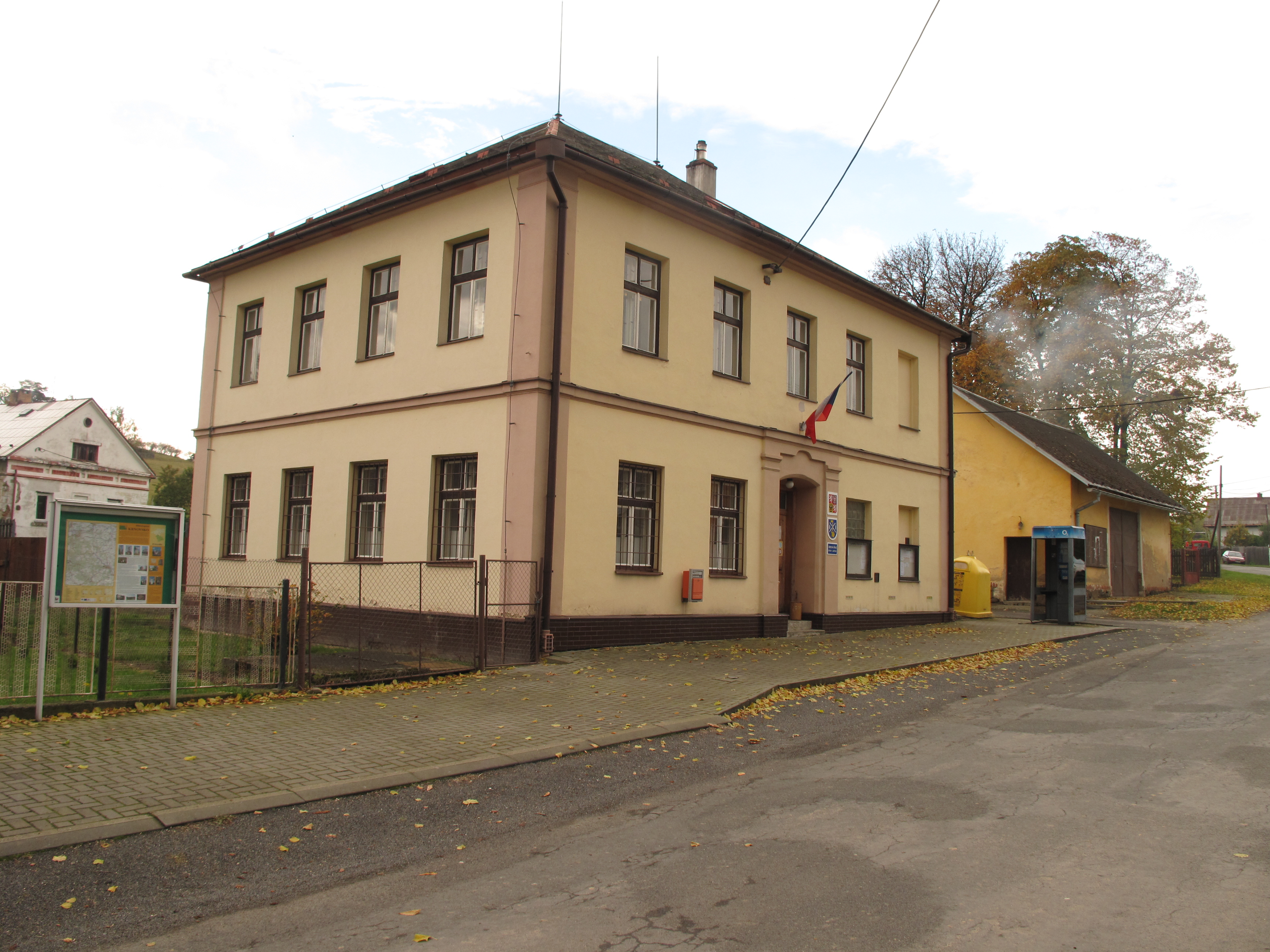 Býkov-Láryšov. Okres Bruntál, Česká republika.